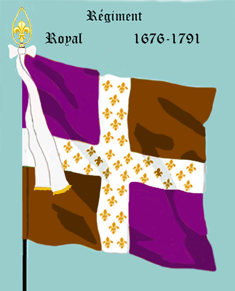 Ordonnanzfahne eines königlich französischen Infanterie-Regiments. - Entnommen und überarbeitet aus: „LES UNIFORMES ET LES DRAPEAUX DE L'ARMÉE DU ROI“ Marseille 1899. (Drapeau d'Ordonnance d' un régiment française d'infanterie royale.)